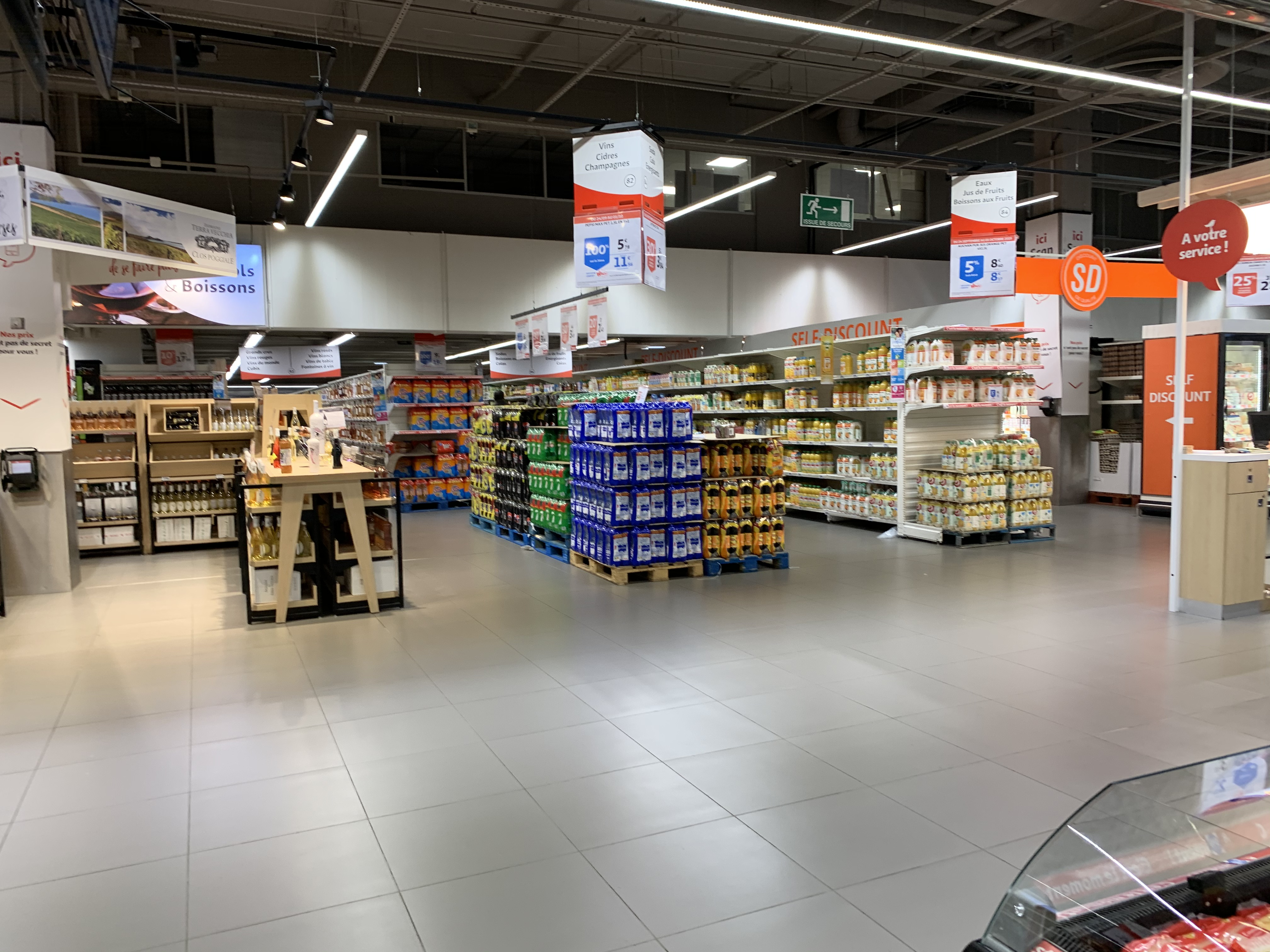 Rayons au Auchan du centre commercial Val de Fontenay, Fontenay-sous-Bois.